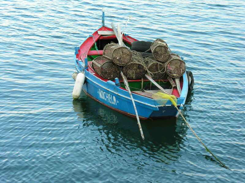 Foto de uma dorna com apetrechos de pesca.